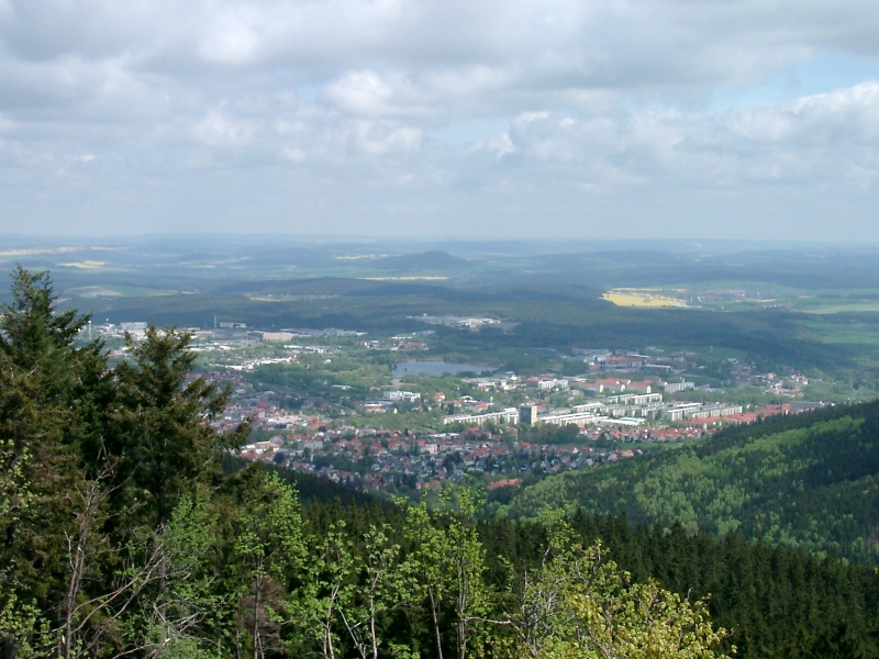 Das Bild zeigt den Blick vom Aussichtsturm des Kickelhahns auf Ilmenau.